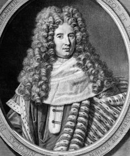 Nicolas Pierre Camus de Pontcarré, Premier président du Parlement de Rouen